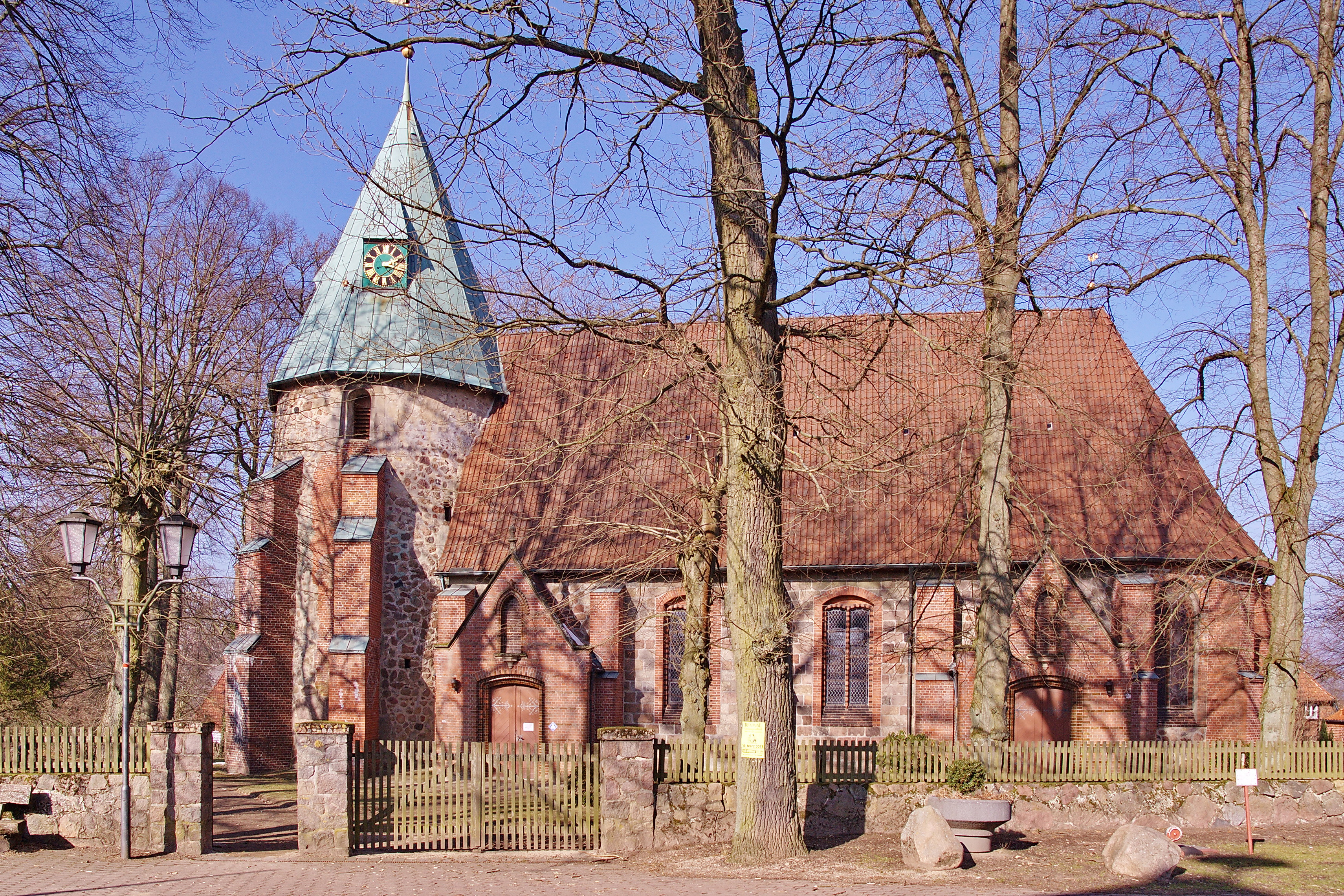 Rundturmkirche St. Peter und Paul-Kirche in Betzendorf, Niedersachsen, Deutschland